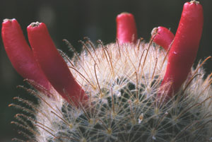 Mammillaria pennispinosa aus der Sammlung von „Andreae Kakteenkulturen“, Inh. Michael Januschkowetz, Ausserhalb Lengfeld 17, 64853 Otzberg-Lengfeld